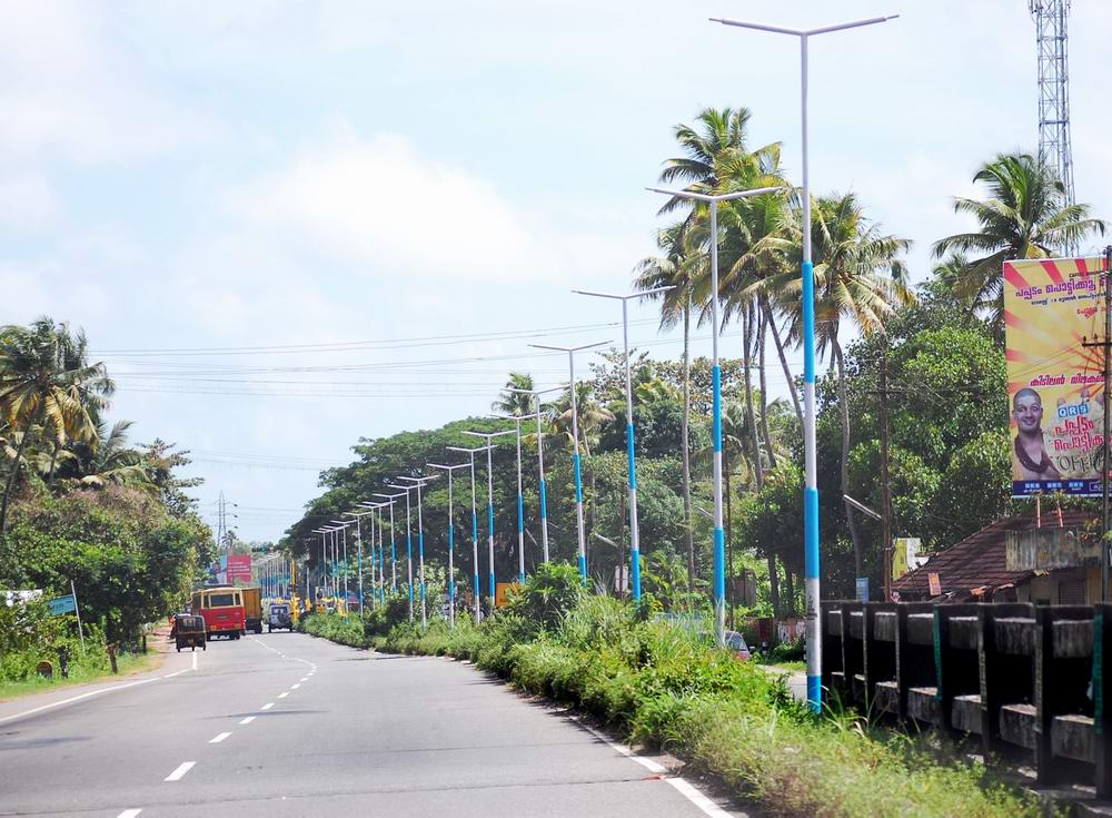 Roads of kerala(NH47) - ചേർത്തലയിൽ നിന്നും